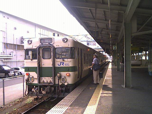 広島駅停車中の急行みよし